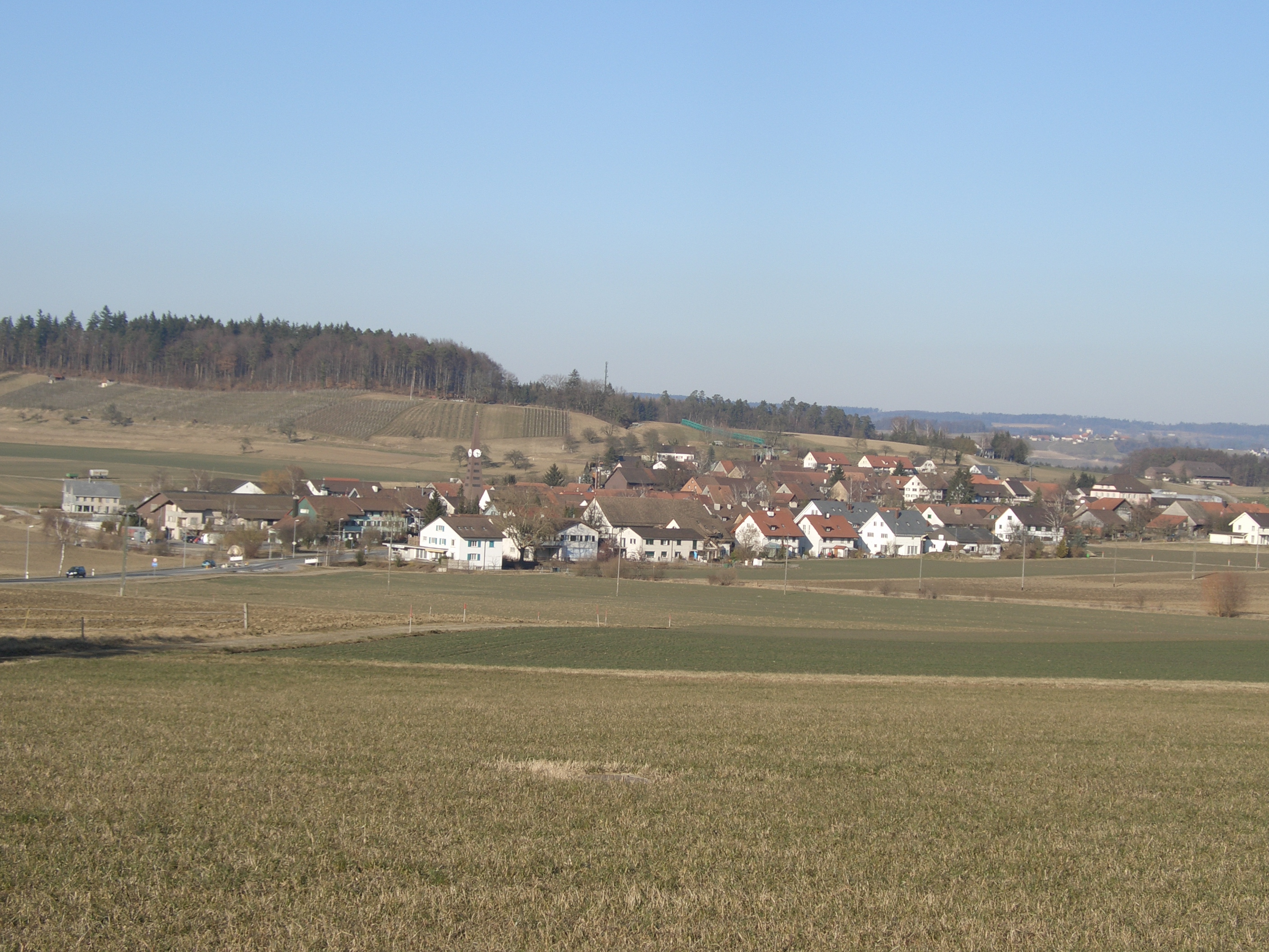 Rickenbach ZH, Schweiz